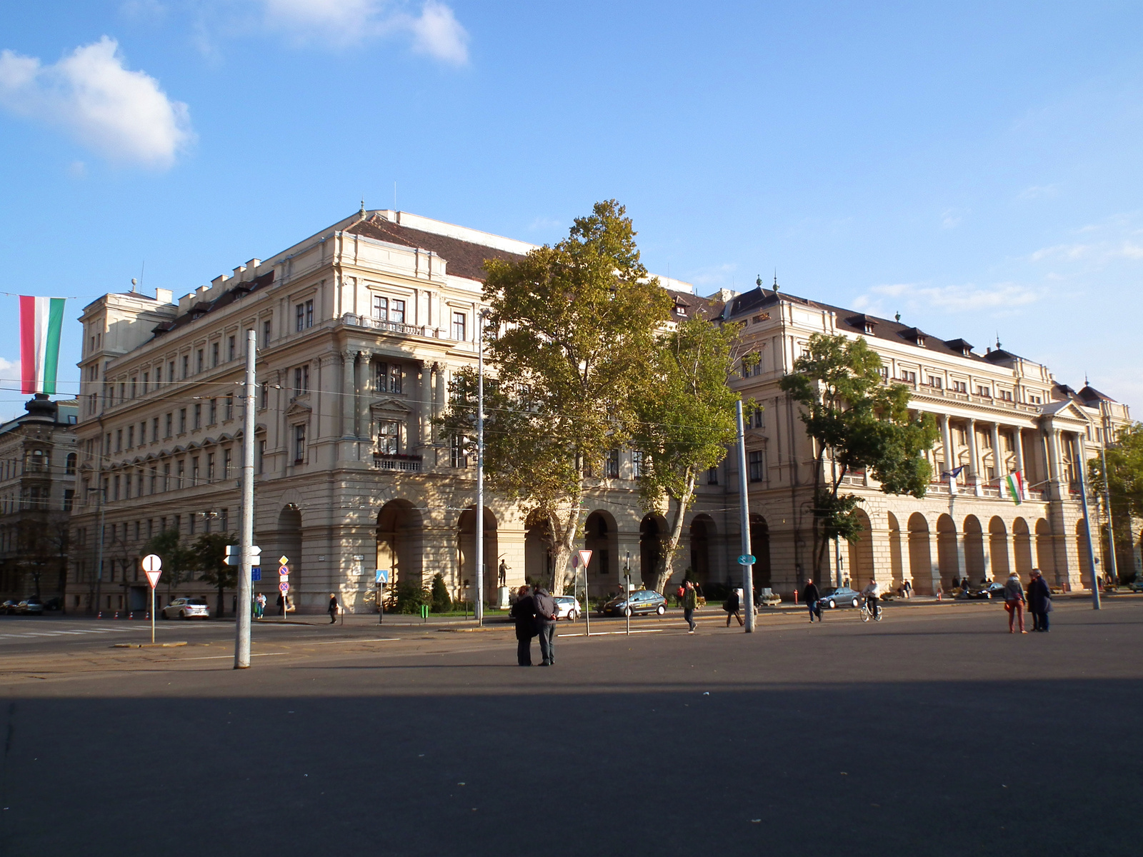 Földművelésügyi Minisztérium (Budapest 5, Kossuth Lajos tér 11., Alkotmány utca 1., Báthory utca 2., Kozma Ferenc utca 2.) This is a photo of a monument in Hungary, Identifier: 510